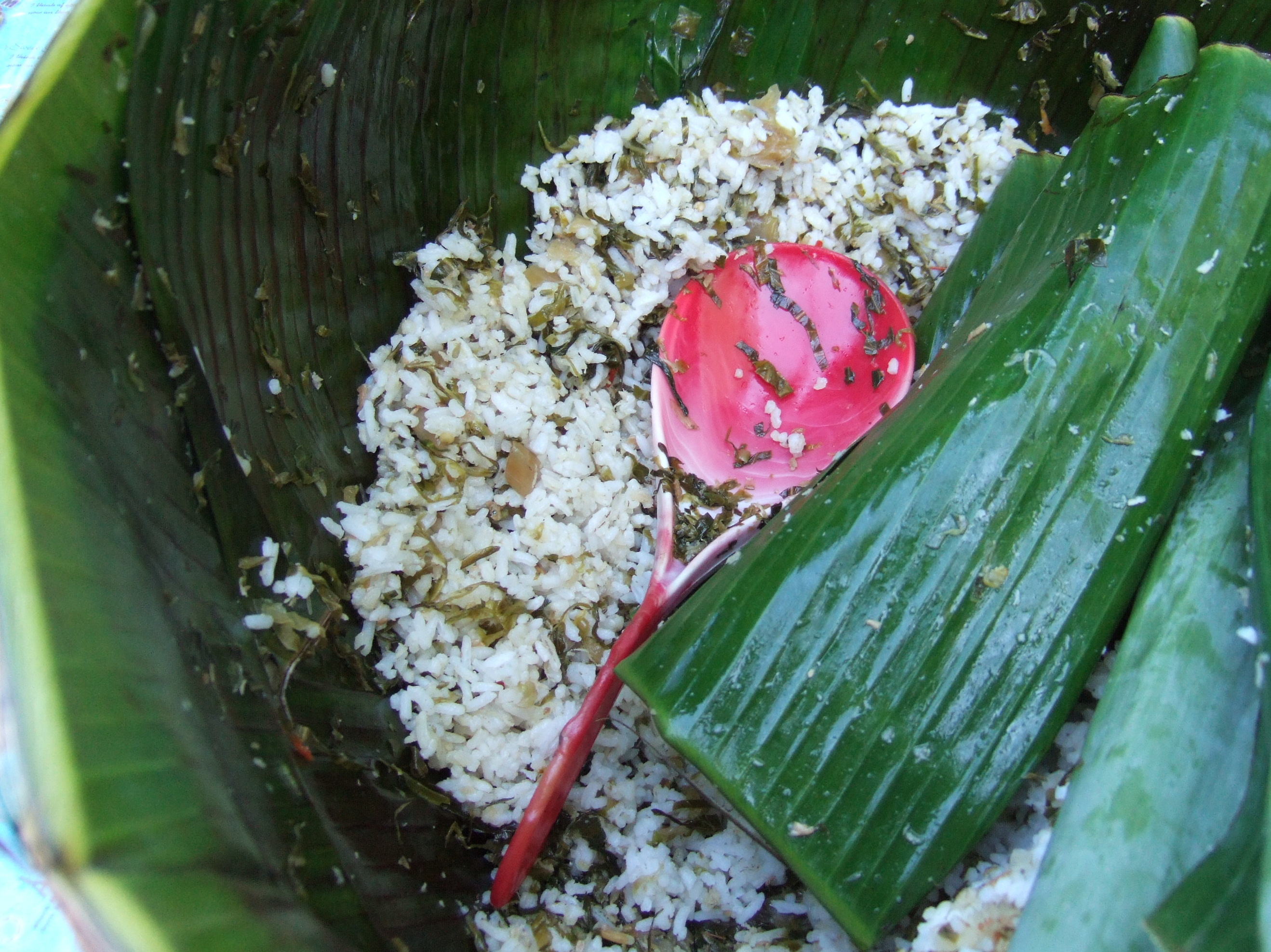 Nasi megono, Wonosobo, Central Java, Indonesia.